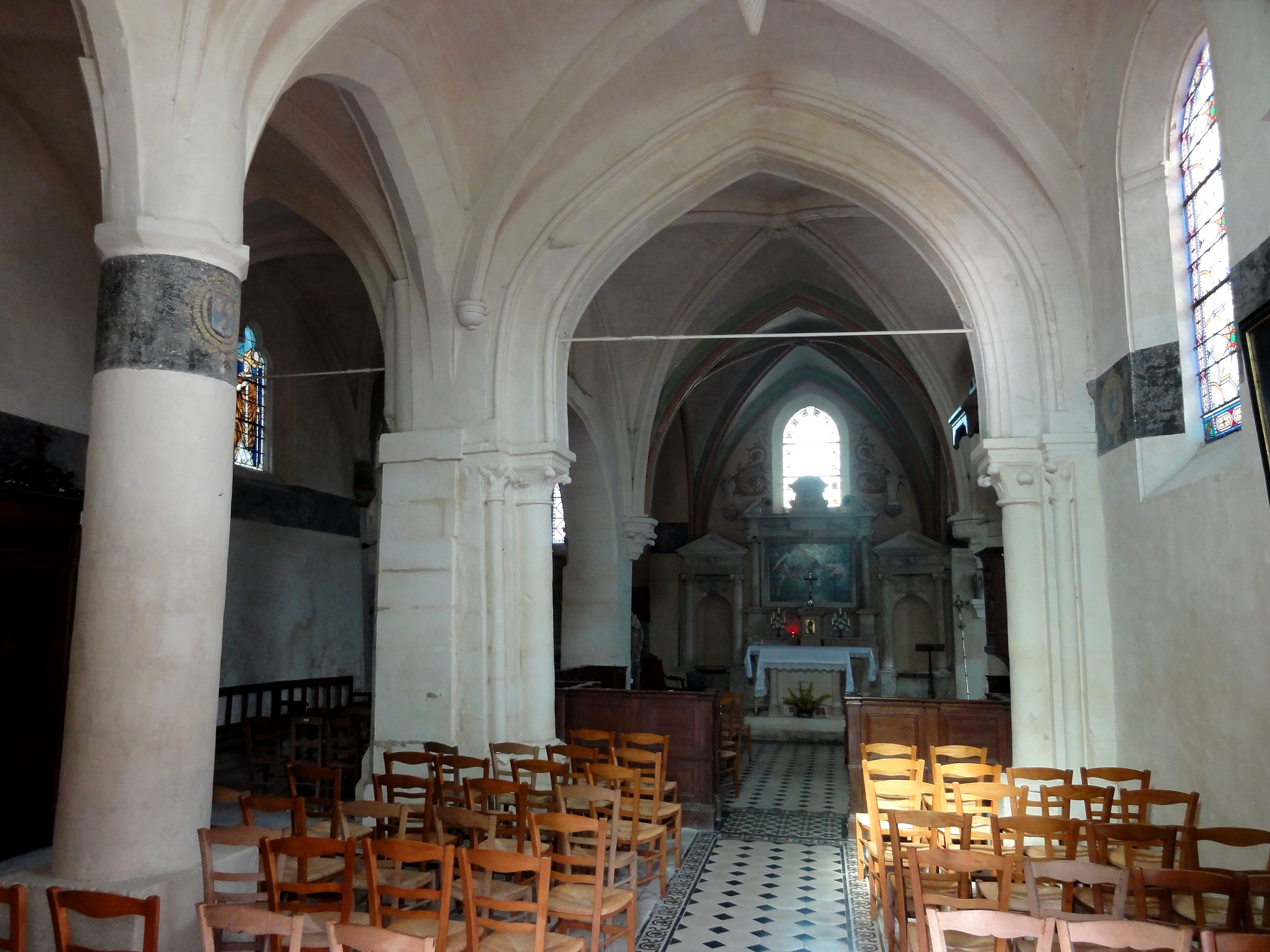 Vue générale intérieure.